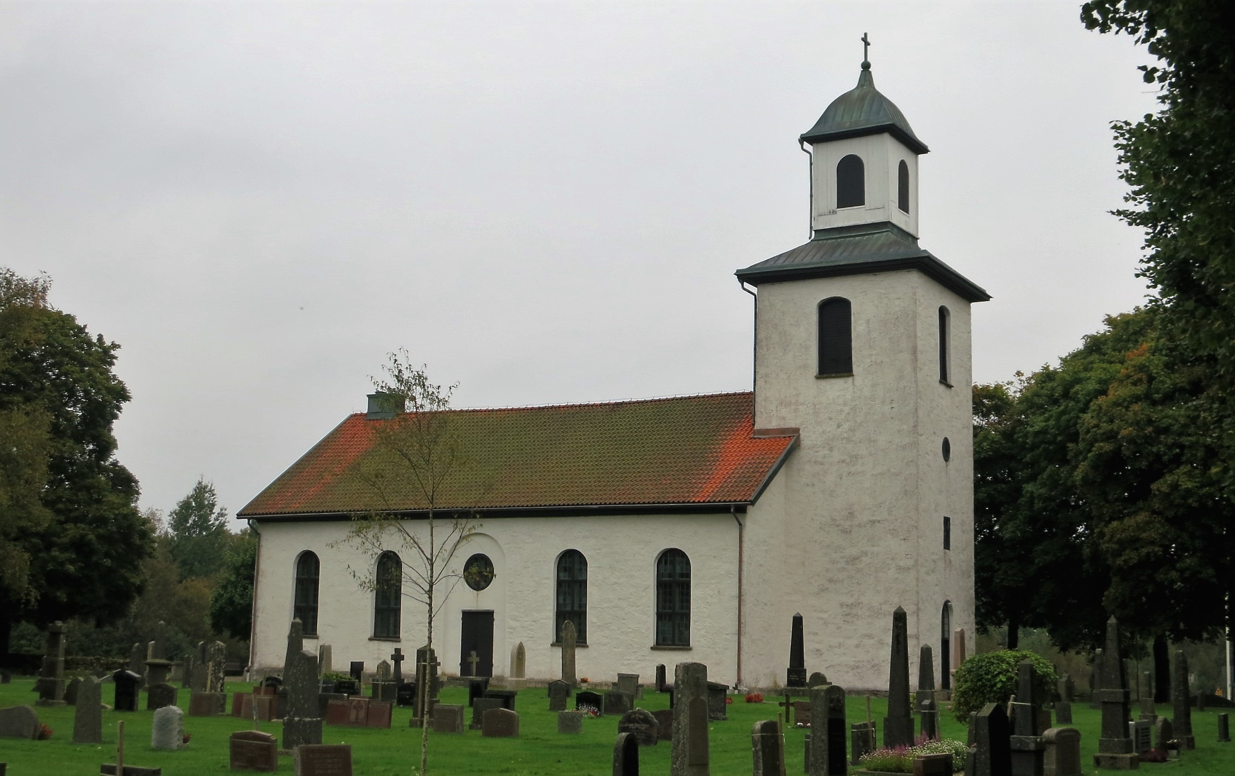 Fagereds kyrka